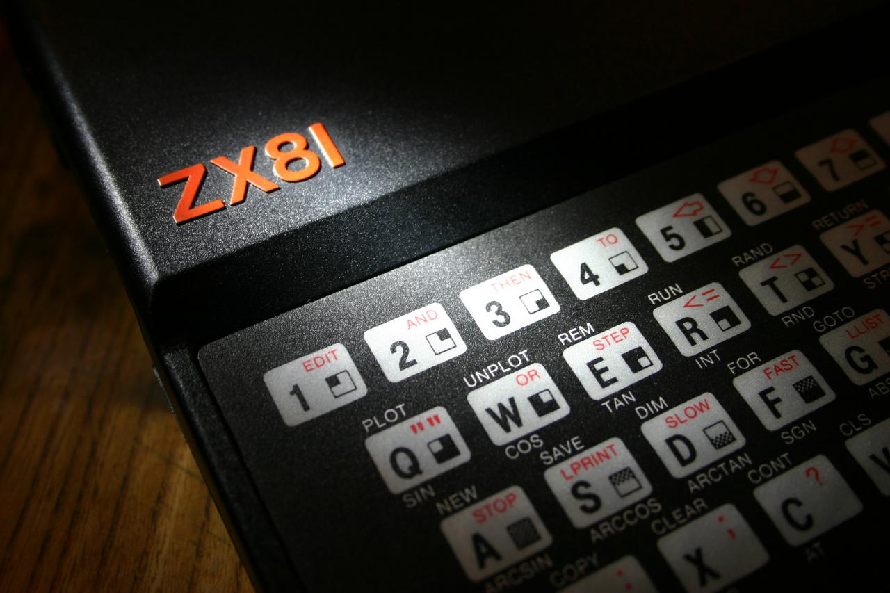 ZX81 close-up